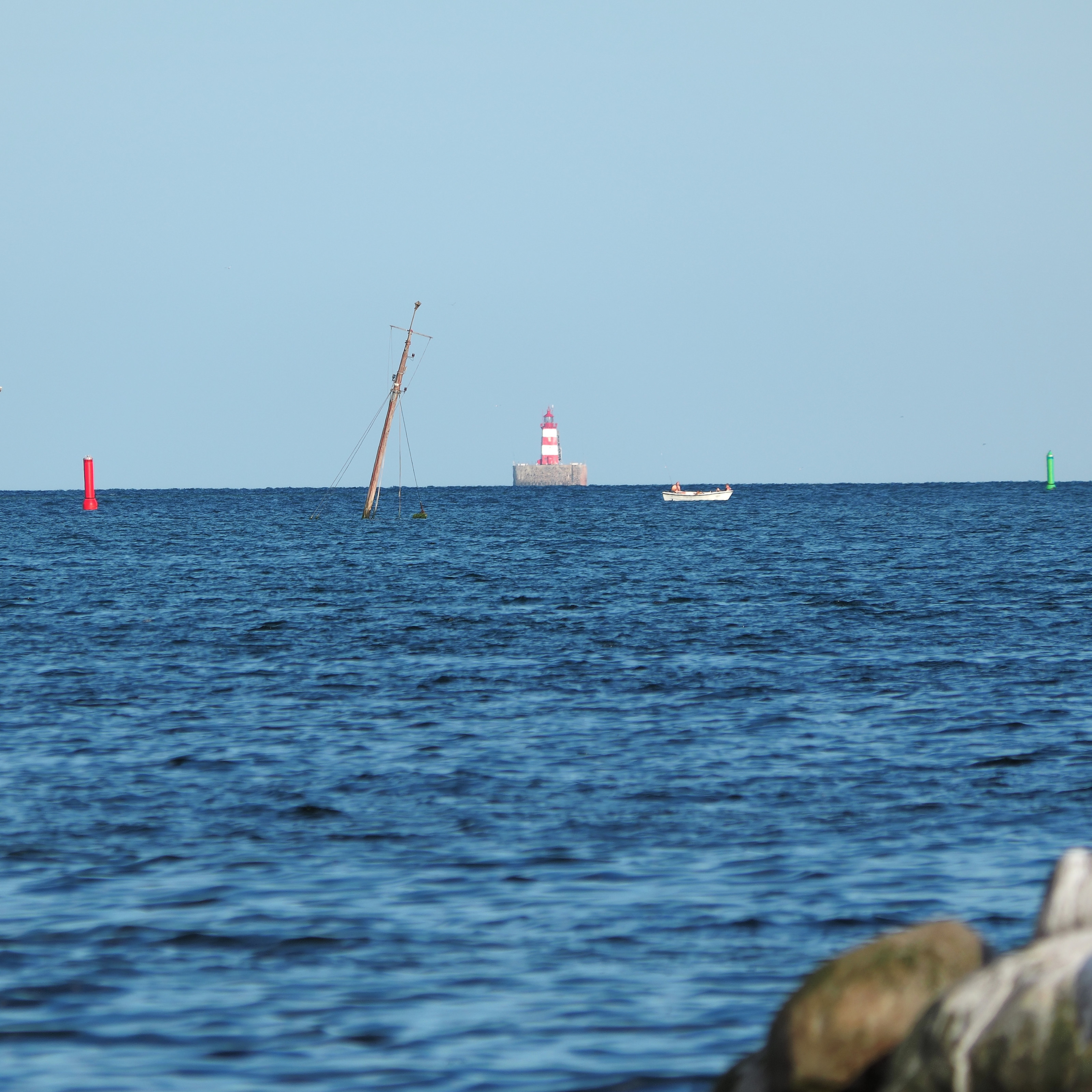 Der Leuchtturm Hals Barre fyr von Egense aus gesehen, etwa vier Kilometer vor der Ostküste von Jütland